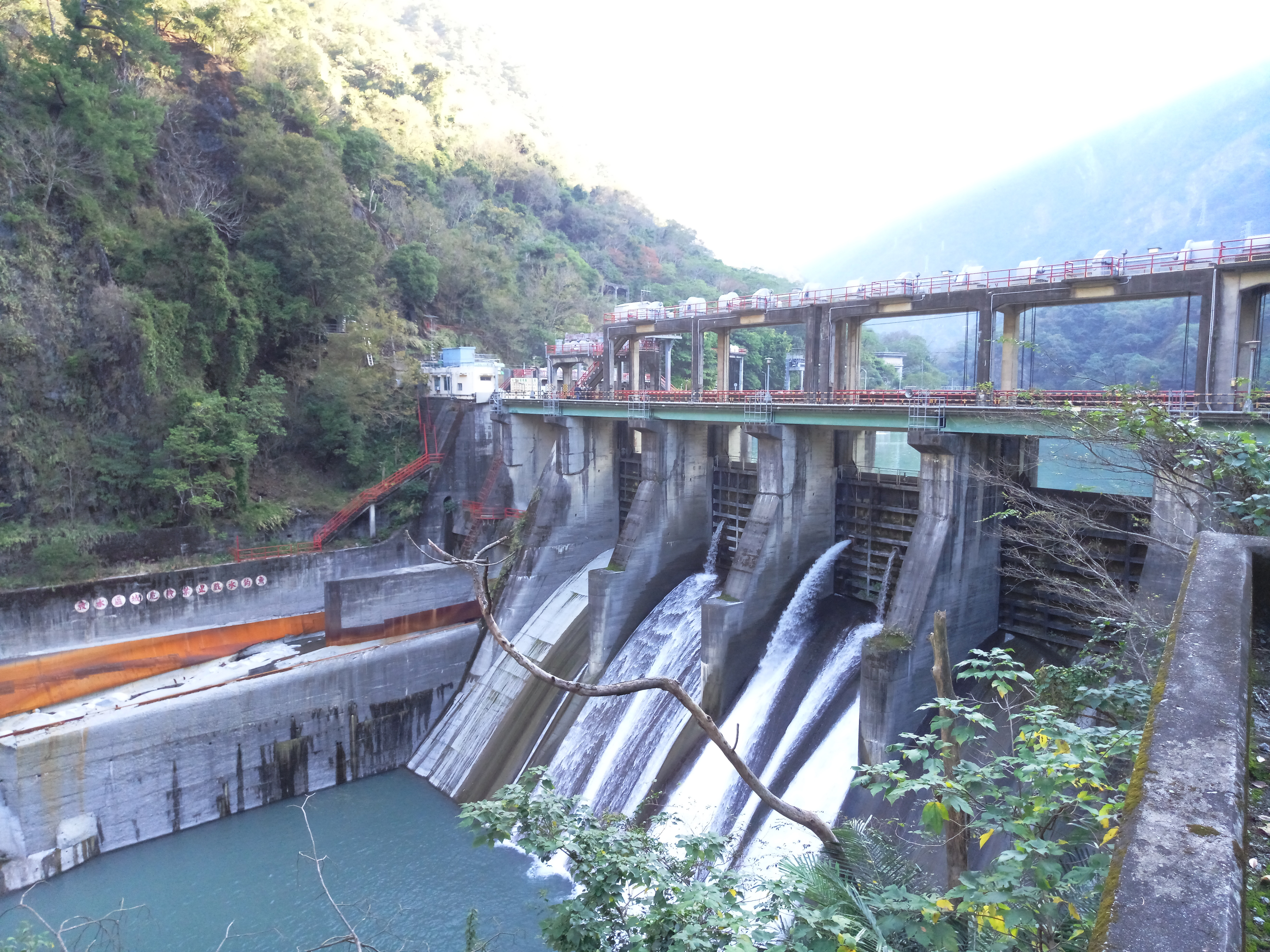 台電大甲溪發電廠天輪壩正面